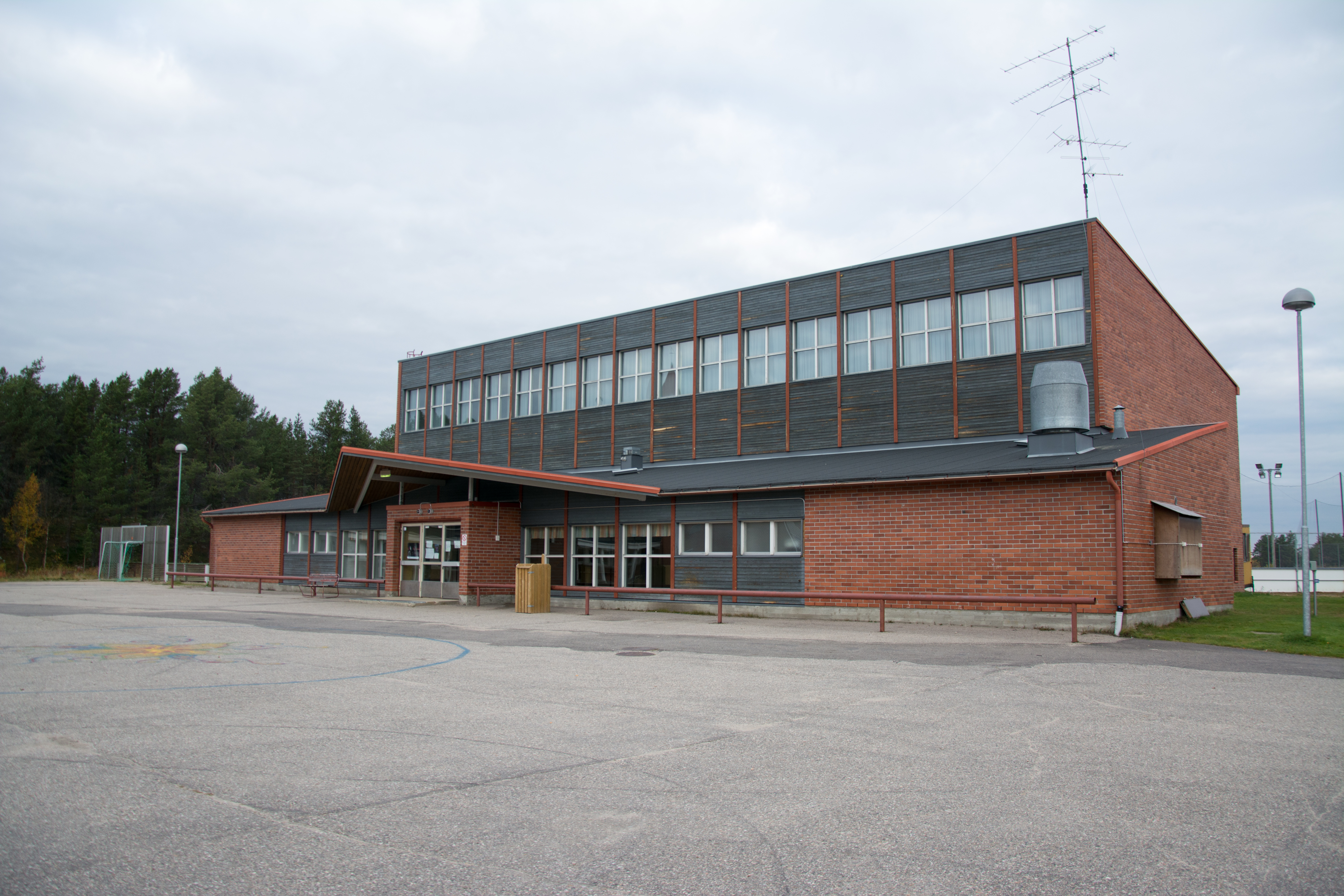 Enontekiön kirjasto